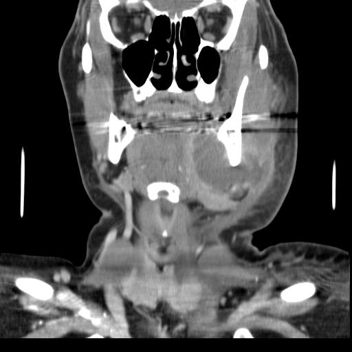 Scanner d'un volumineux abcès dentaire (à droite de l'image) sous-mandibulaire de face avec une inflammation importante du tissu cellulo-graisseux sous-cutané.